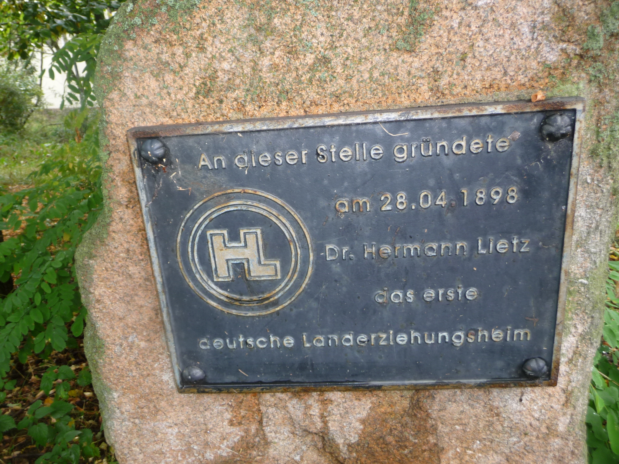 Gedenkstein an Hermann Lietz, der in Ilsenburg (Harz) 1898 das erste deutsche Landschulheim errichtete.